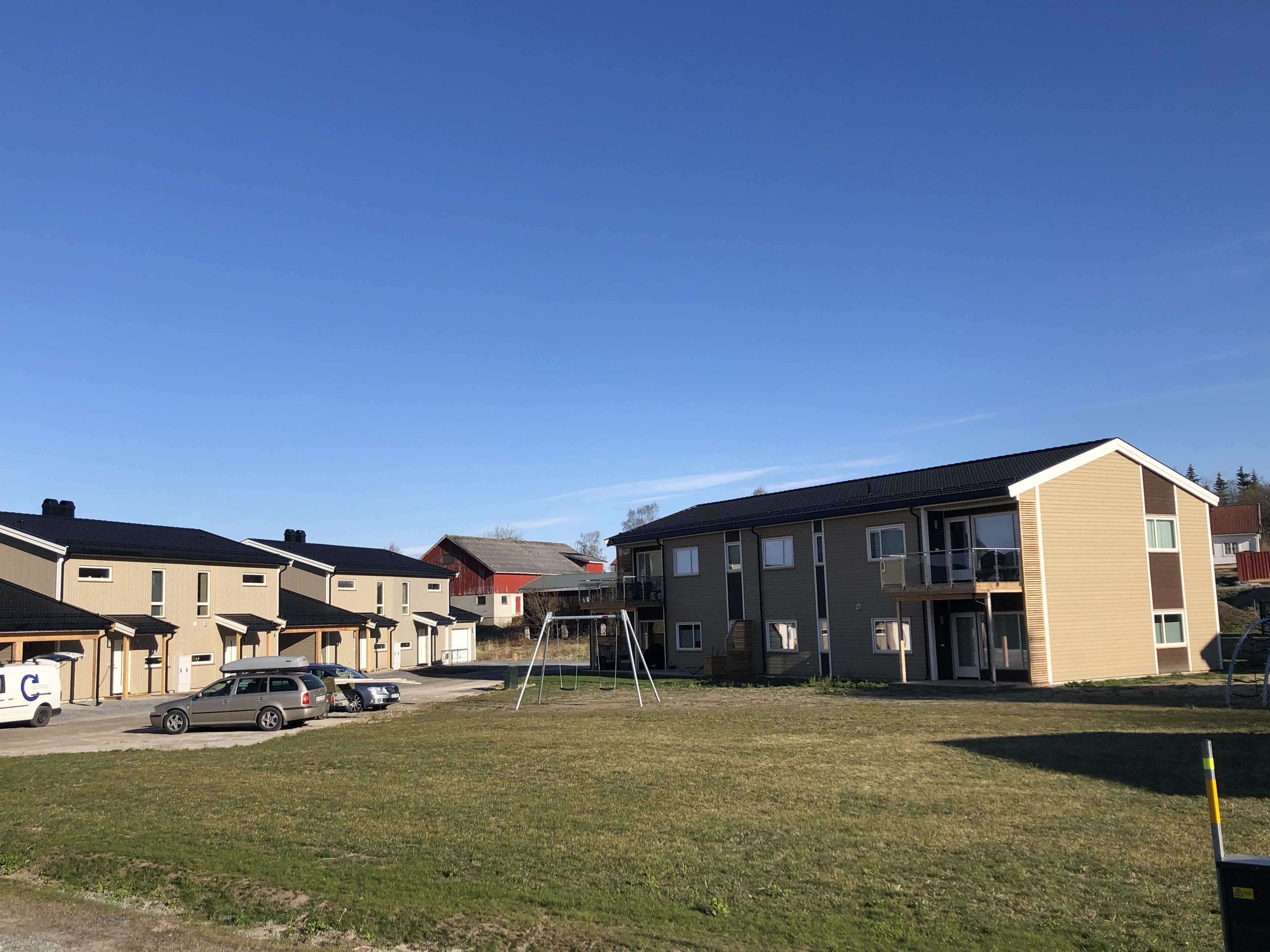 Tonettes vei, Ringerike